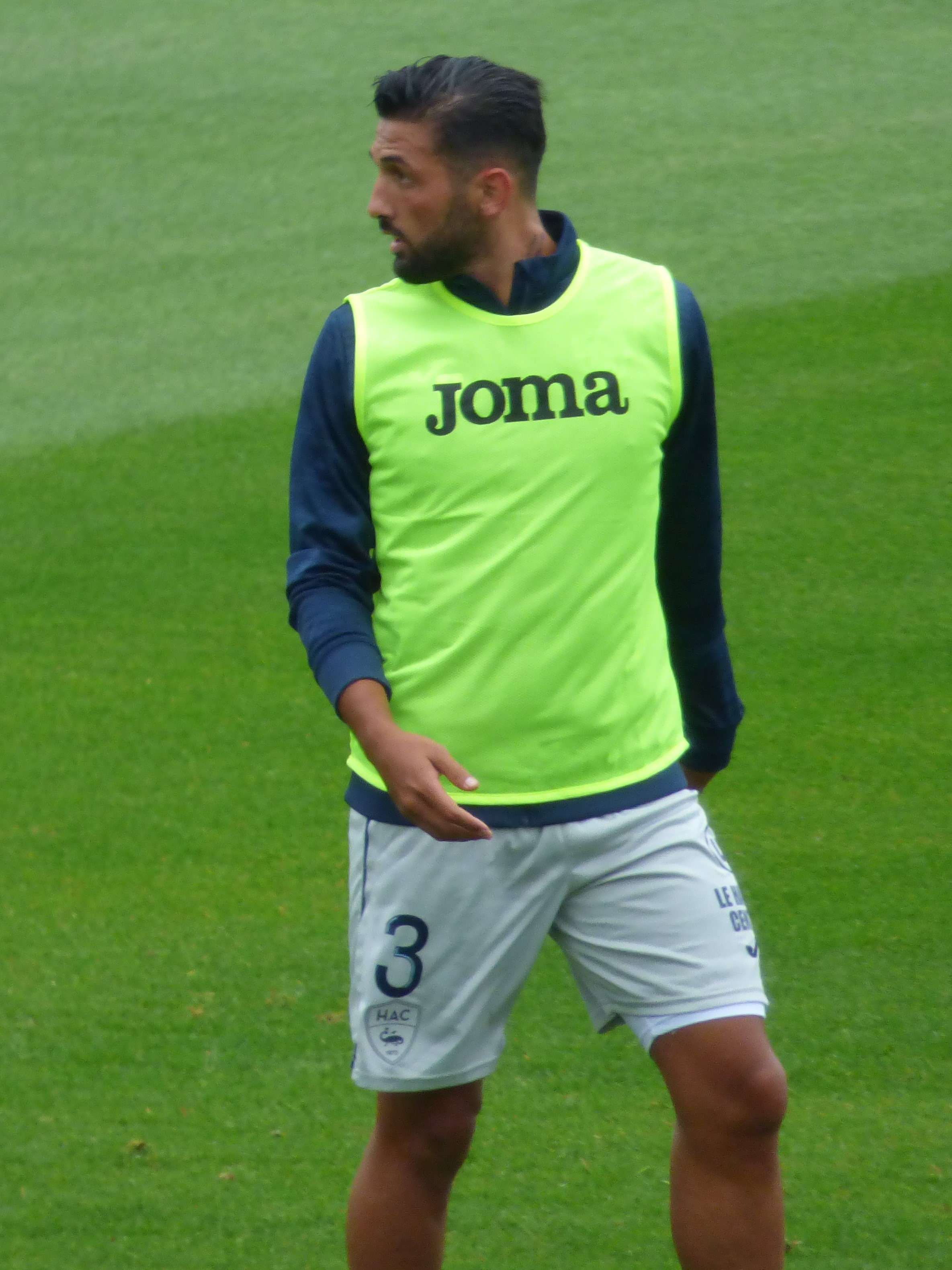 Umut Meraş lors du match amical RC Lens / Le Havre, le 16 juillet 2020, au Stade Paul-Guerre de Billy-Montigny.